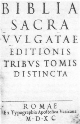 Titelblatt der Vulgata von 1590. Gedruckt in der 1587 gegründeten Vatikanischen Druckerei.